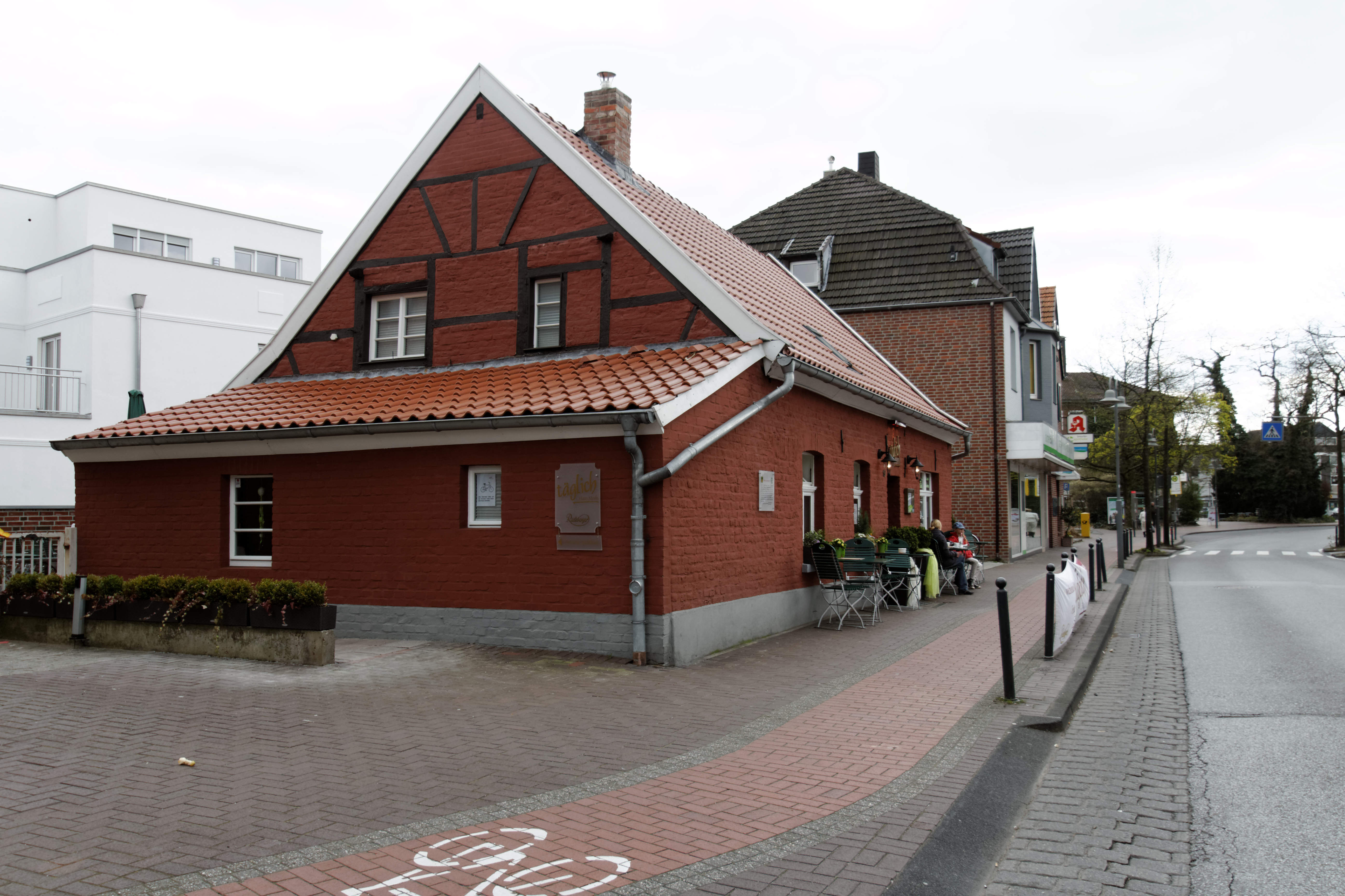 Ratingen, Speestr. 10; Haus Merks; Denkmalliste A 214